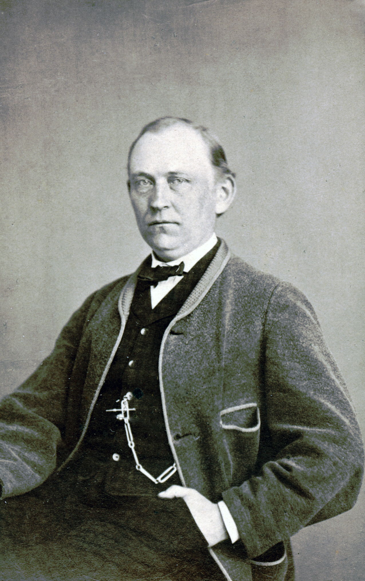 Hjalmar Agardh, teaterdirektör 1864